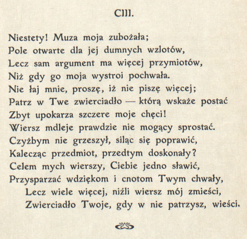 Sonety Shakespeare'a I-CXXXIV i CXXXVII-CLIV tłumaczenie Maria Sułkowska (MUS) sonet 103 (strona 117)